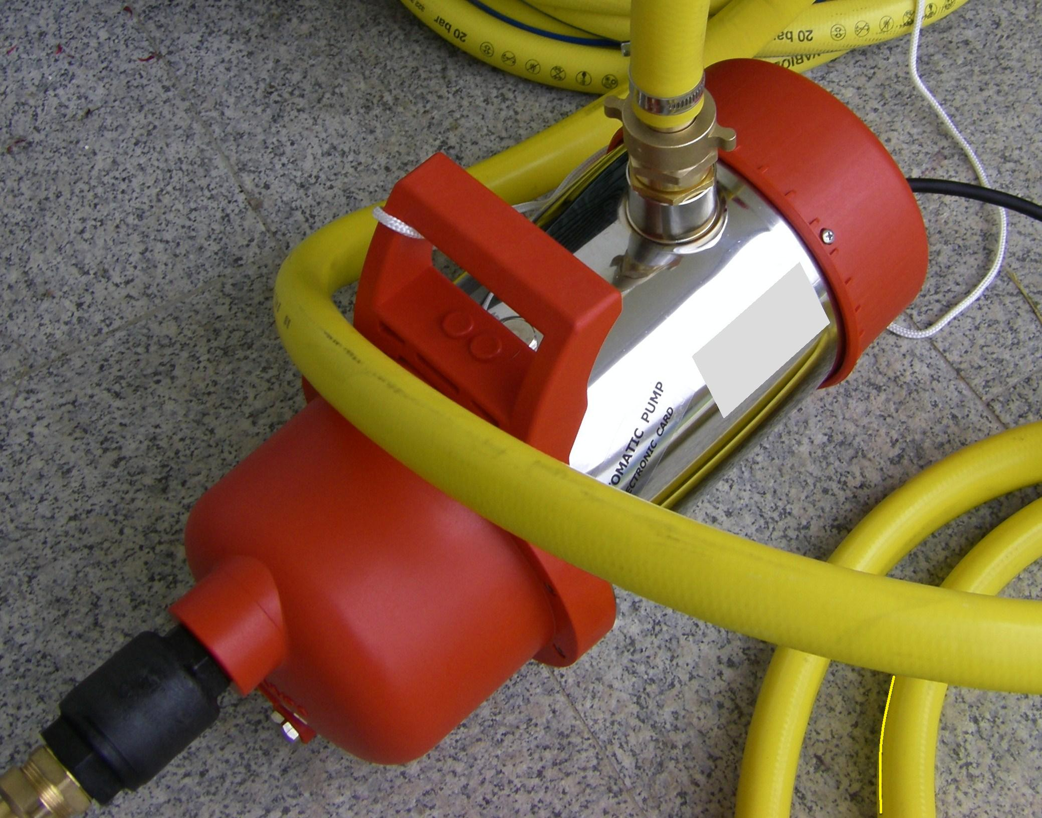 Tauchpumpemit angeschlossenem Schlauch u. Rückschlagventil